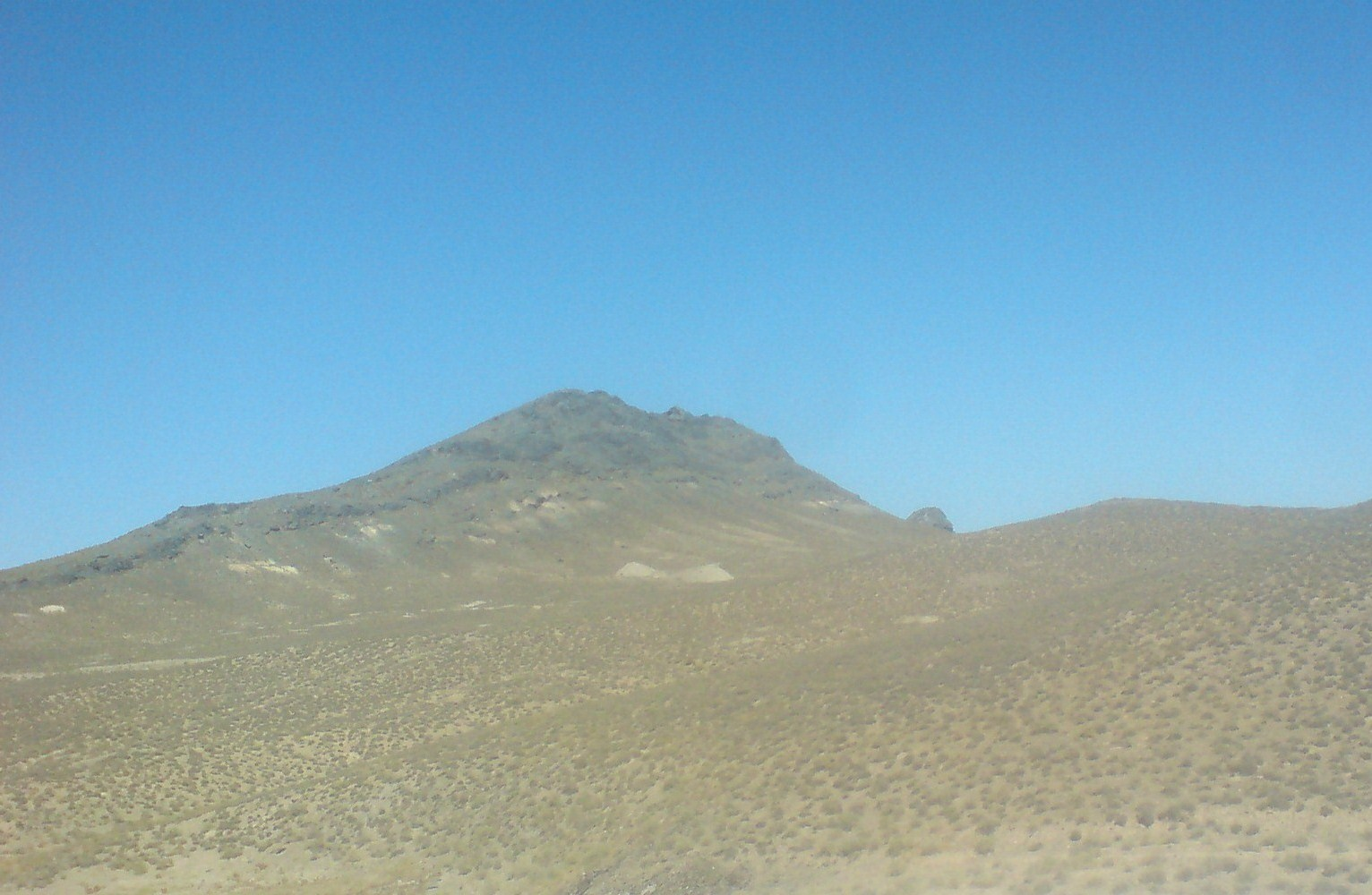 Горы Тамдытау у Бесапана